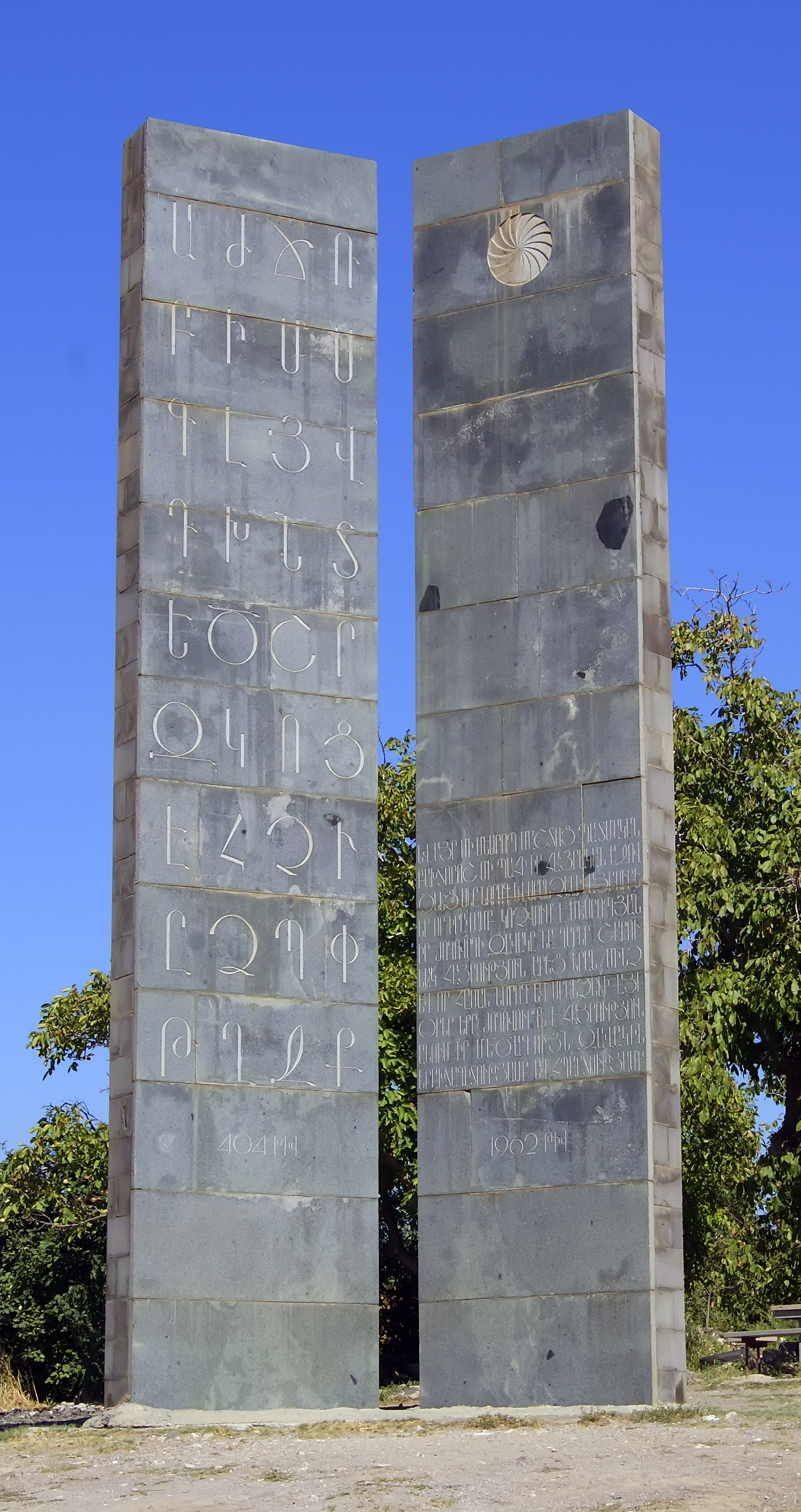 Հայոց այբուբենի հուշակոթող, Օշական 113/25